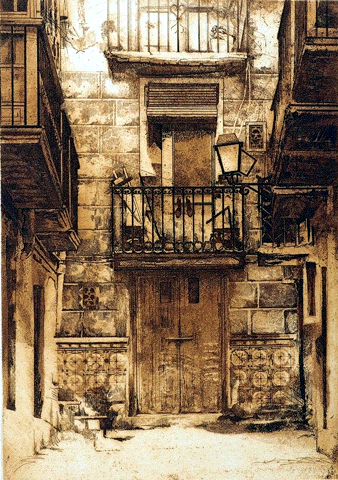 Grabado estampado de publicación José Antonio Sánchez Baillo